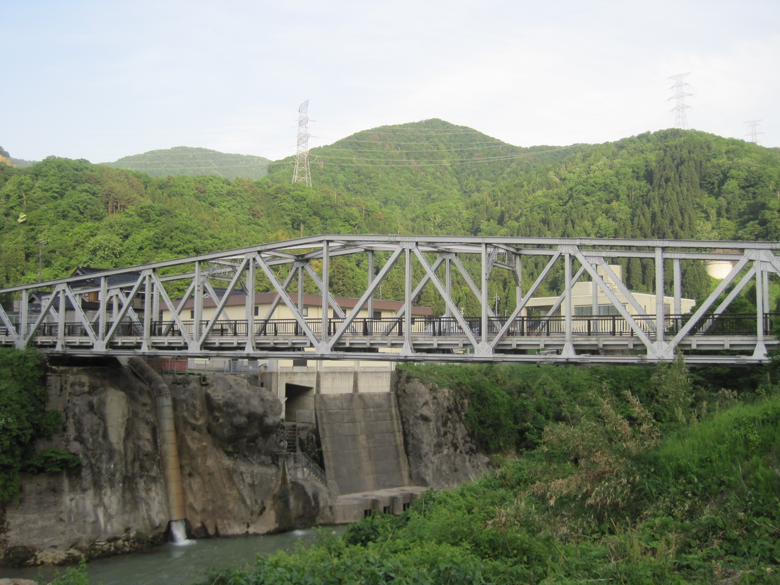 手取川に架かる金名橋（石川県白山市）。廃止された北陸鉄道金名線の一部で、現在は自転車専用橋となっている。